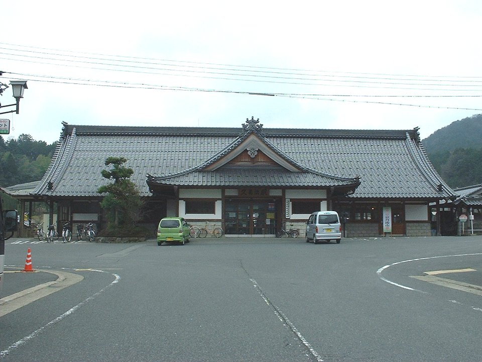 久美浜駅 駅舎 ※撮影当時は熊野郡久美浜町